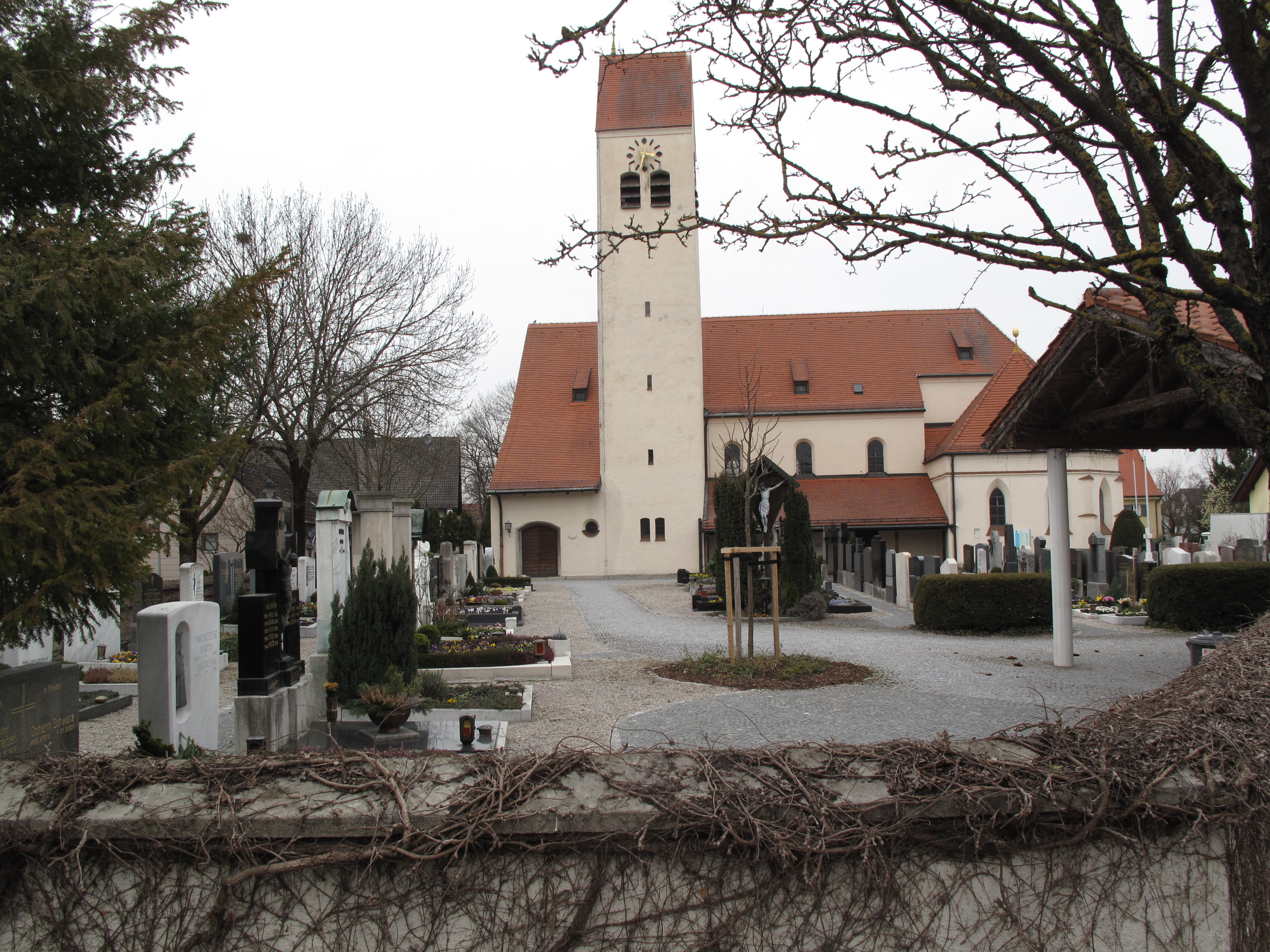 Katholische Kirche St. Peter und Paul, Ansicht von Süden, im Vordergrund der Krichfriedhof. Aschheim bei München.